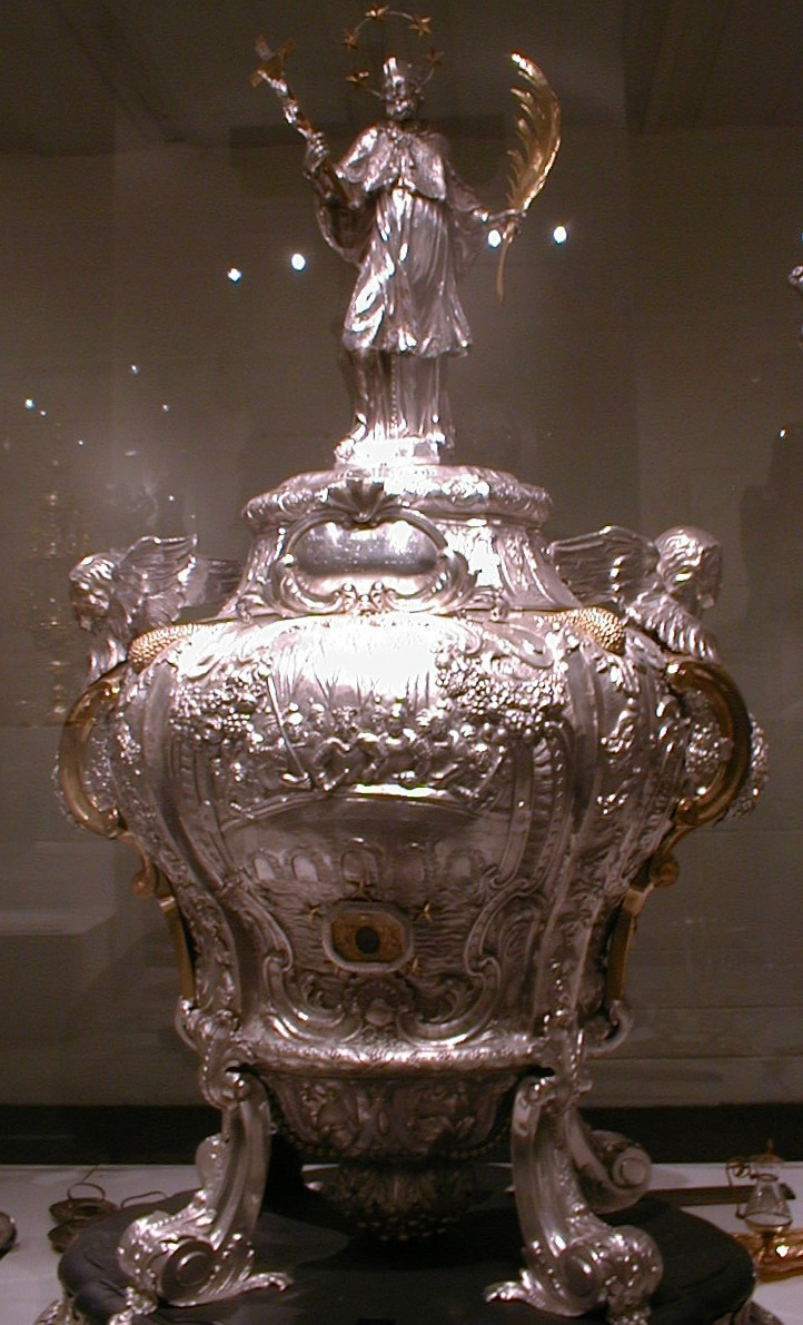 eigen opname zilveren reliekschrijn Johannes Nepomucenus uit kerk Sint Niklaas 18de eeuw; +- 80cm hoog.